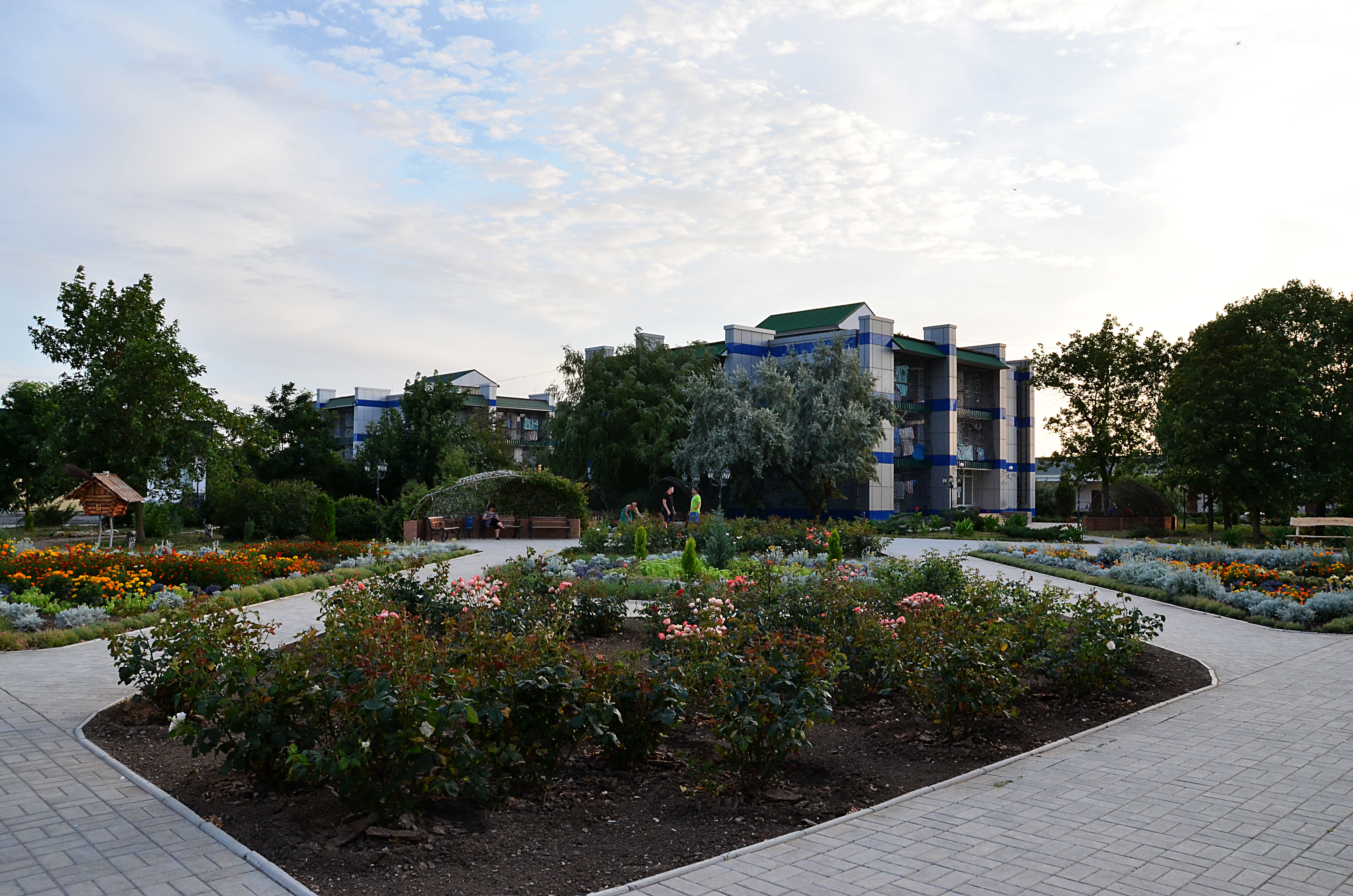 База отдыха